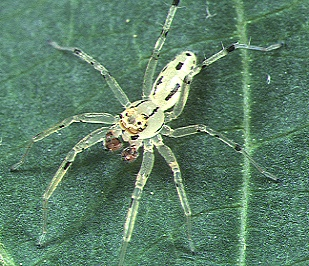 male Asemonea tanikawai from Okinawa.